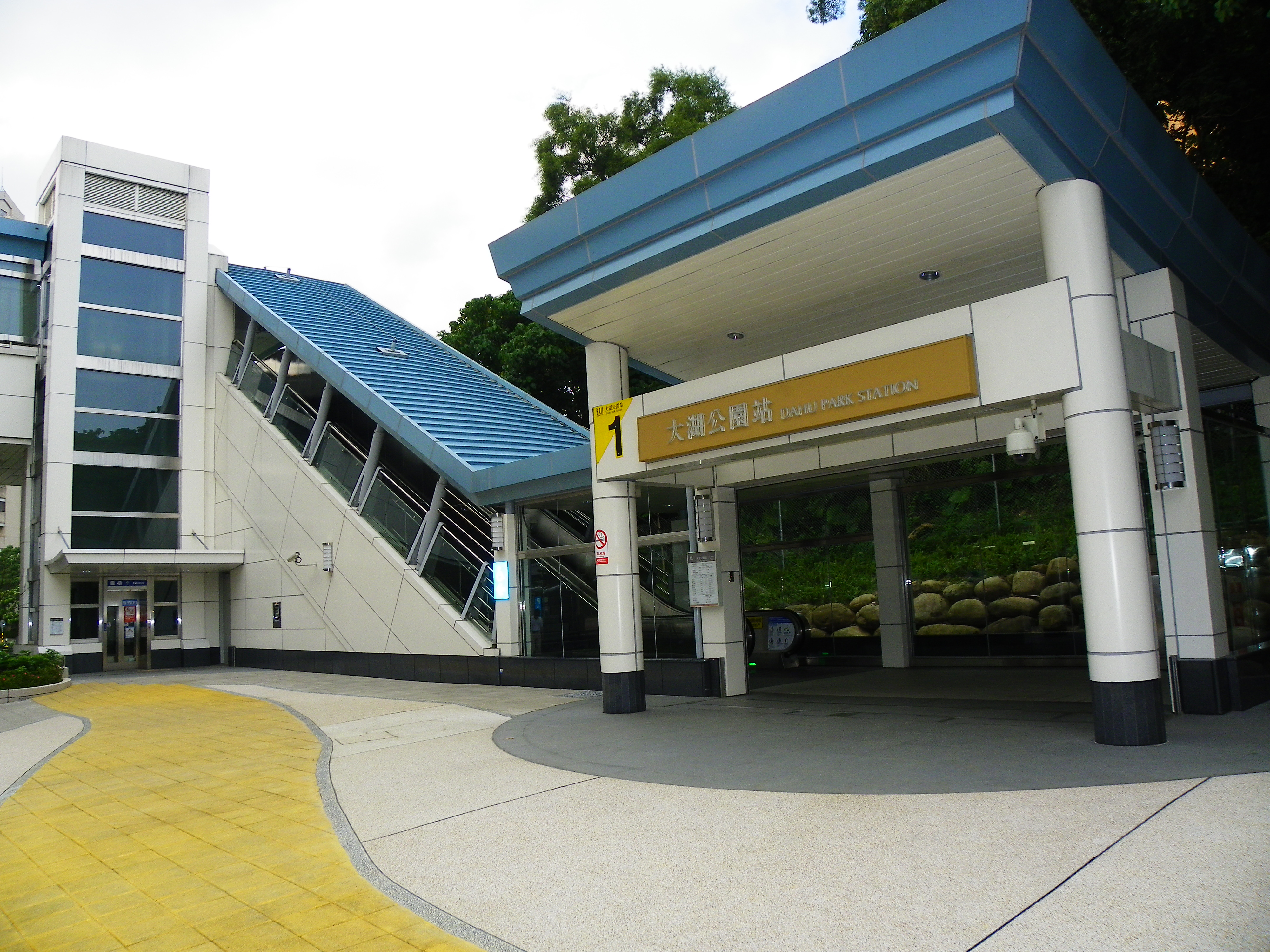 台北捷運内湖線大湖公園駅1号出口。